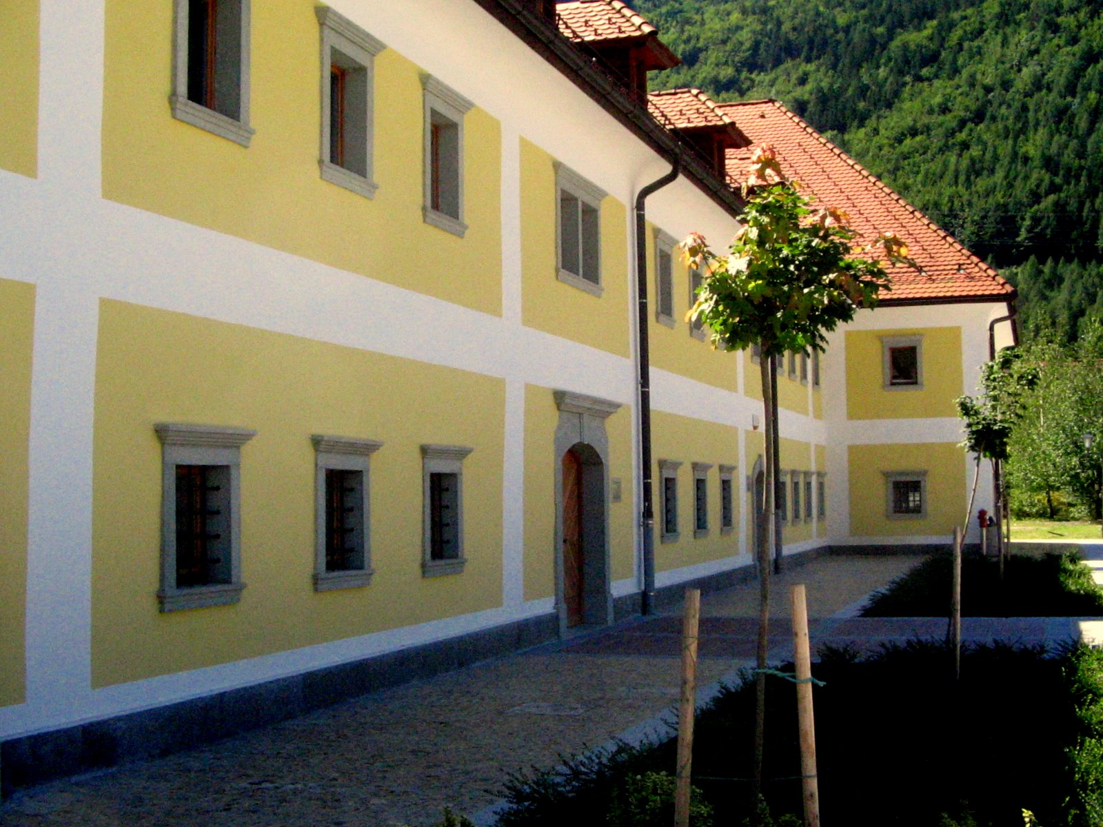 Delavsko stanovanje, Jesenice